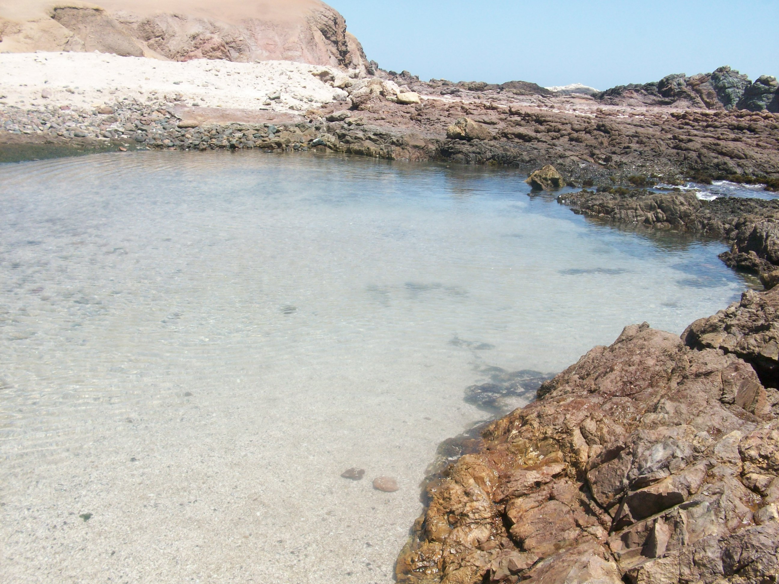 Playa La Pocita en Huarmey, Ancash, Perú.